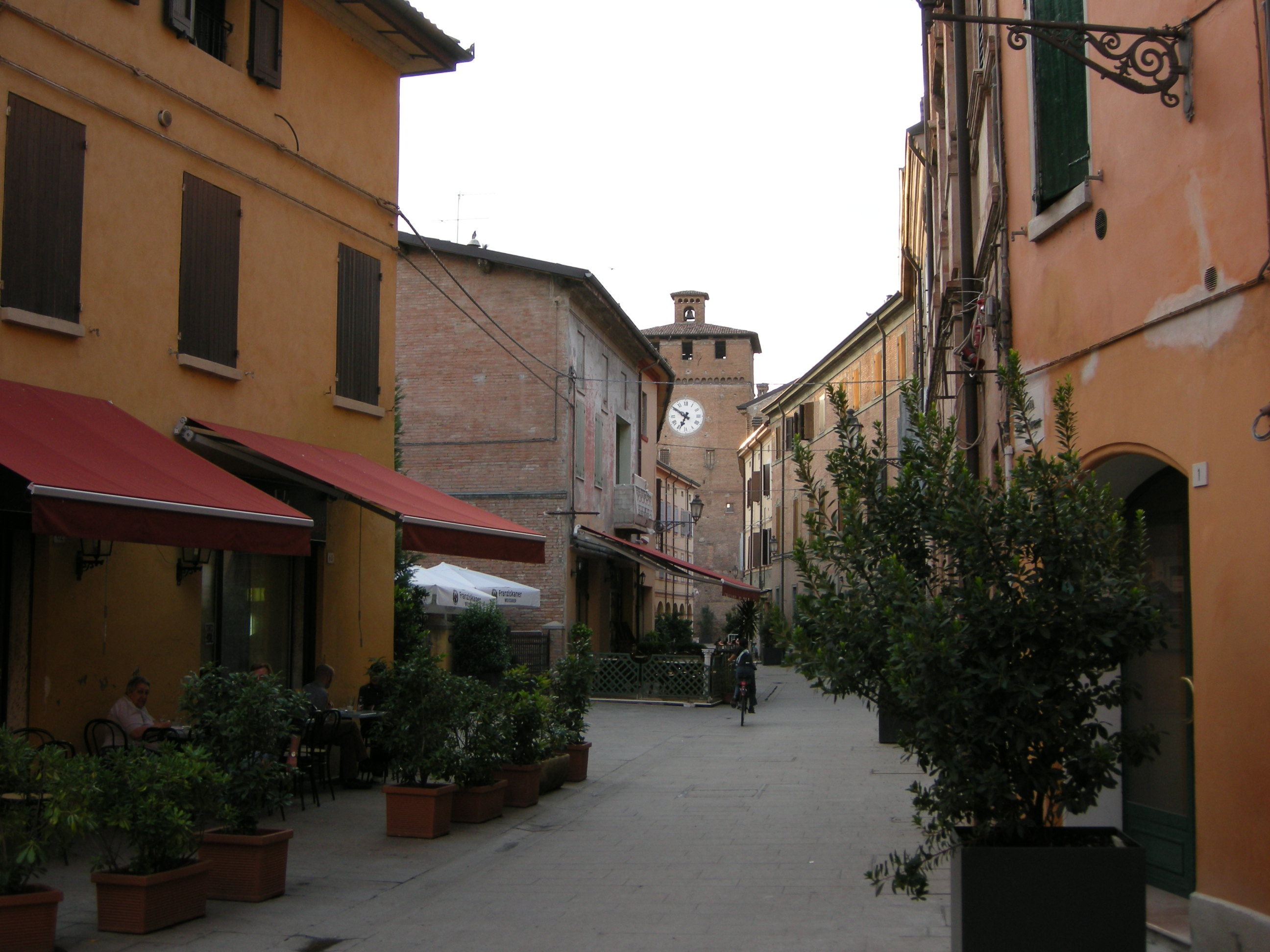 Nonantola, via roma